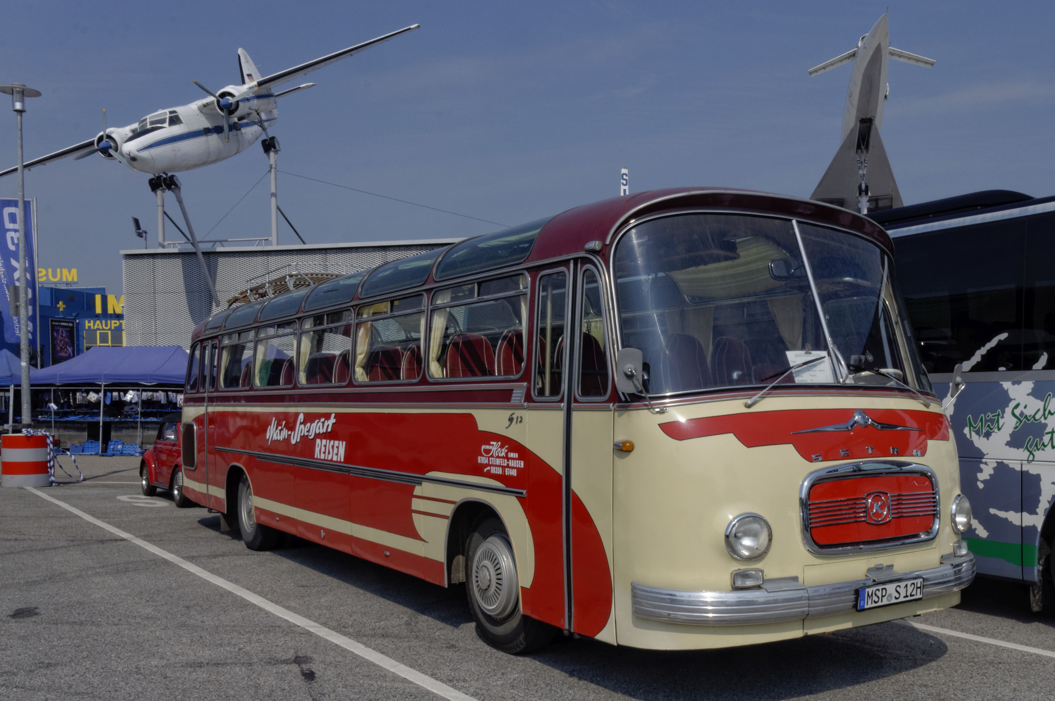 Agri Historica 2019